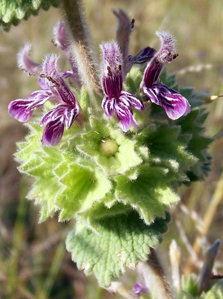 Ballota hirsuta (marrubio, manrubio) :Detalle de un verticilo - Cabezo de los Ojales, Albatera (Alicante, España).